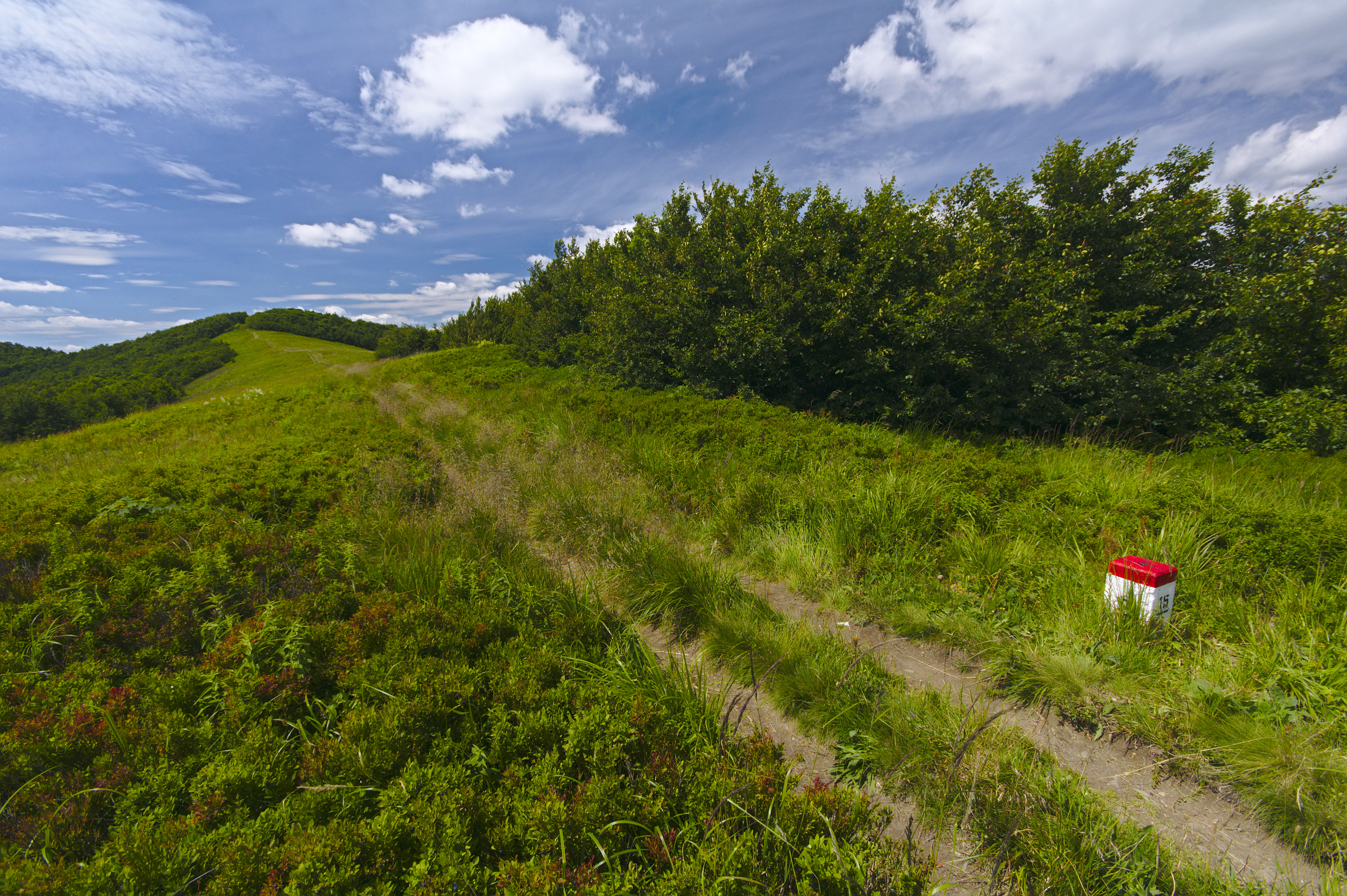 Národná prírodná rezervácia Jarabá skala, Národný park Poloniny